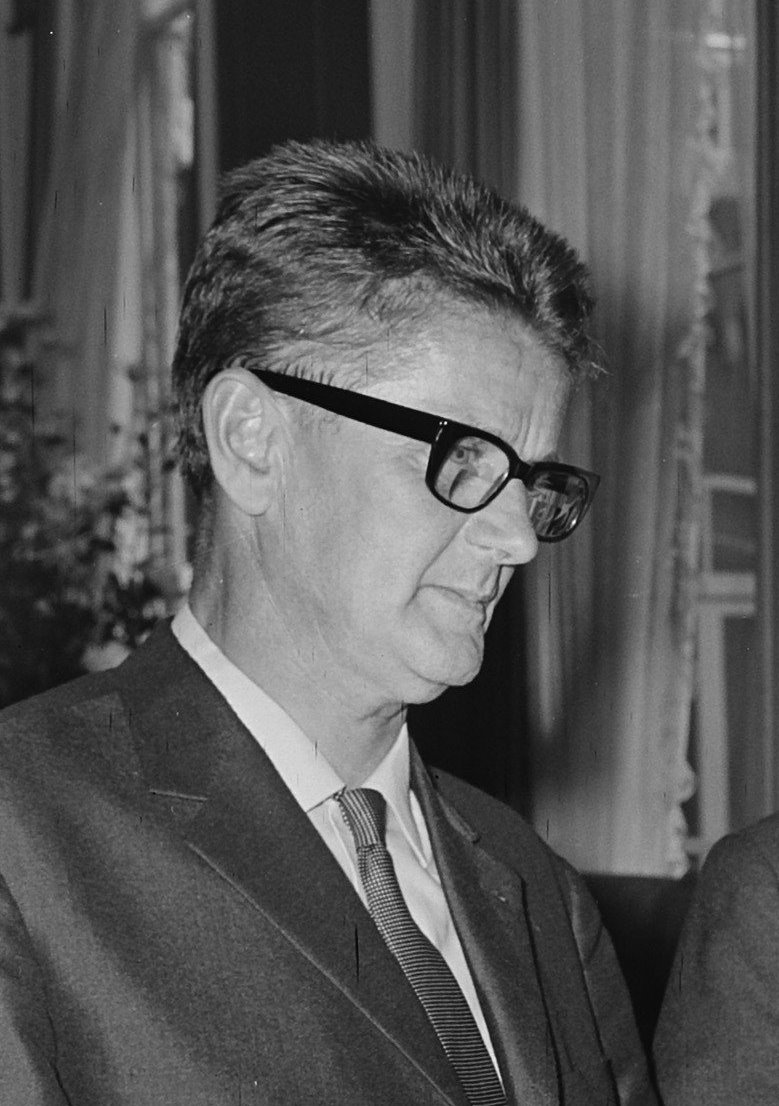 Cas Oorthuys na de uitreiking van de ANWB-prijzen voor publicistische prestaties te Den Haag